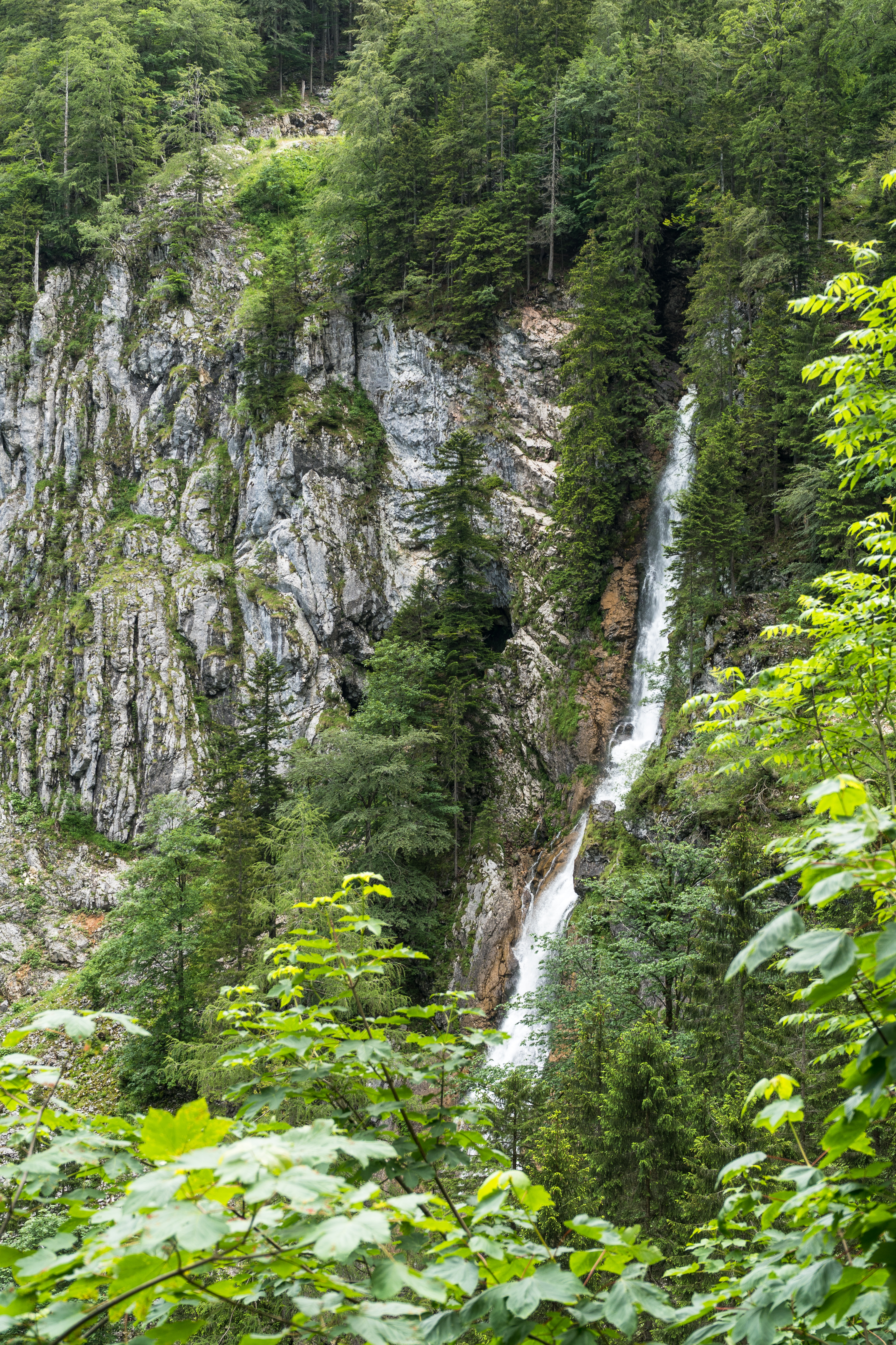 Blick von der Straße auf den Ludwigfall im Mostviertel